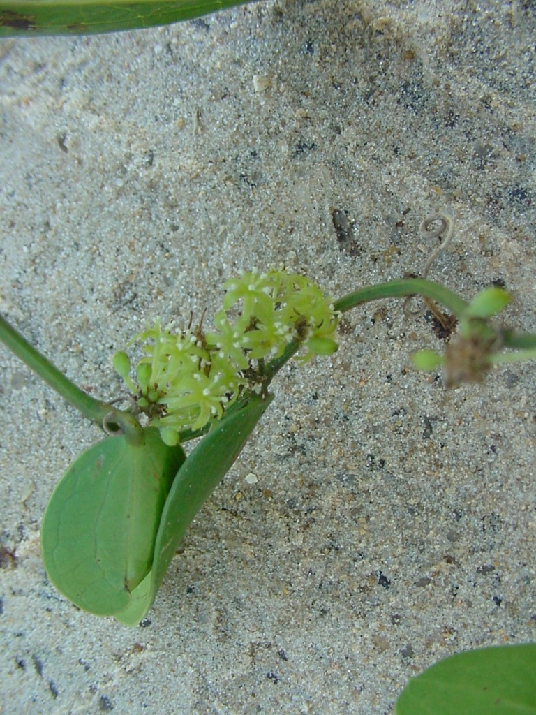 Smilax campestris - SMILACACEAE - Garopaba - SC - Brasil